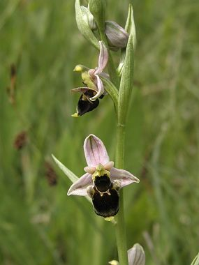 Tořič čmelákovitý Holubyho autor:Zp